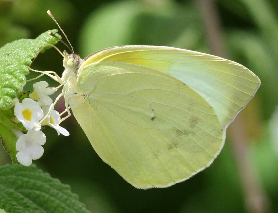 Kricogonia lyside Lyside sulfur ventral